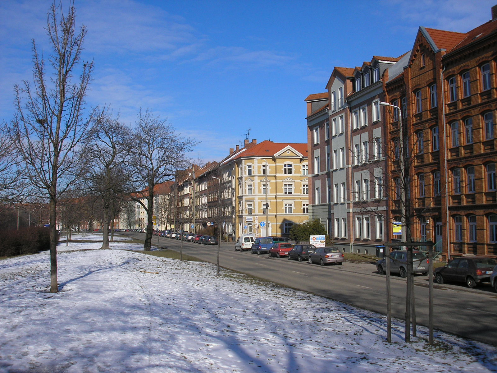 Die Stauffenbergallee in Erfurt (Thüringen).